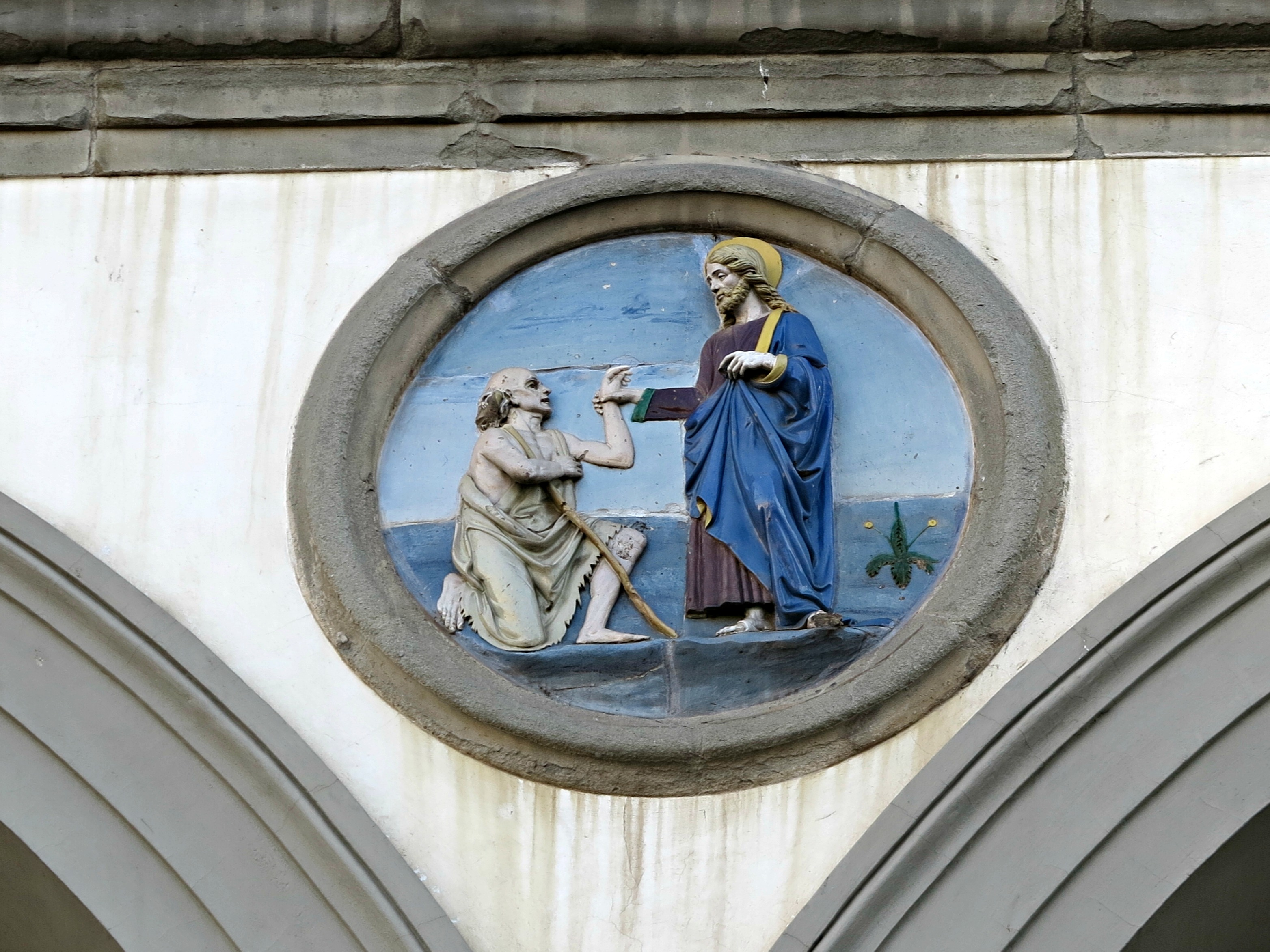 Opera di misericordia di Andrea della Robbia, Loggia dell'ospedale di San Paolo, Fi (1)